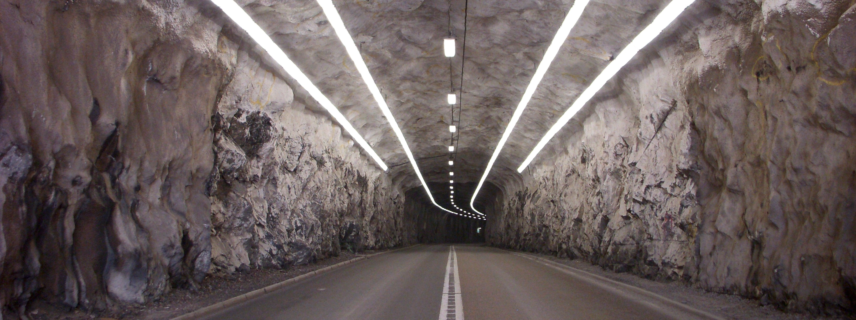 I Muskötunneln, färdrikning mot Muskö